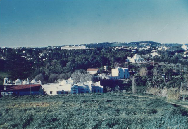 Djenane Chekiken au Val d'Hydra en 1954